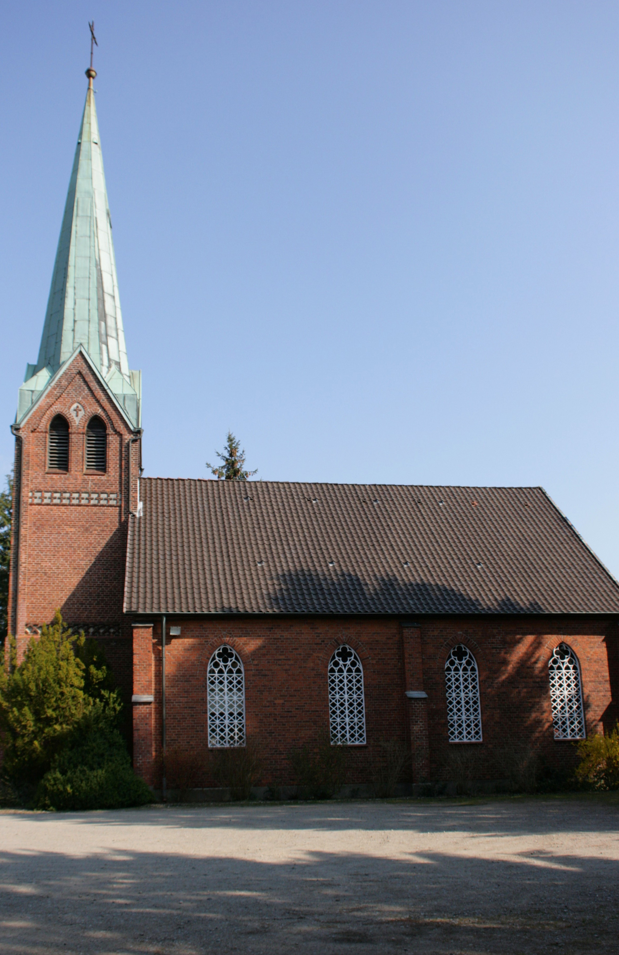 Bethlehemskirche, Hauptstraße 41 in Wriedel